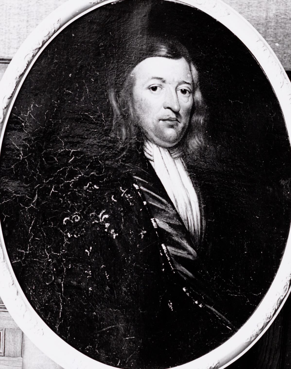 Portret van Laes van Burmania (1638-1691), grietman van Idaerderadiel en Leeuwarderadeel, lid van de gedeputeerde Staten van Friesland